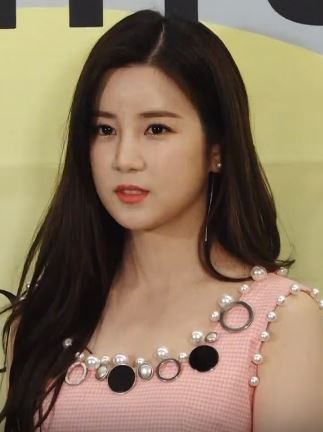 그룹 '에이핑크'의 초롱이 3일 오후 서울 중구 '아크앤북' 에서 열린 곽현주 컬렉션, 2019 F/W 오프쇼에 참석했다